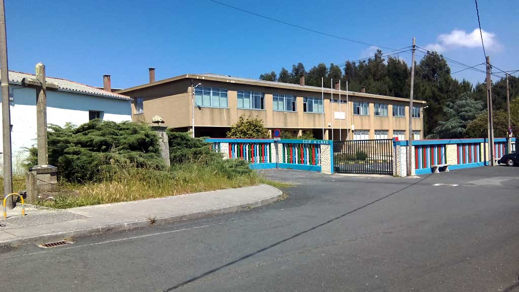 Vista do CEIP a Laxe, Valón.